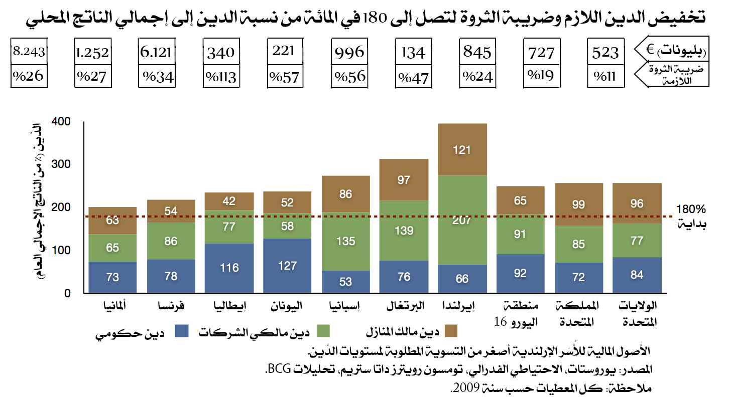 Write-offs necessary in selected Eurozone countries, UK and USA to achieve sustainable debt levels. The graph shows the current debt levels of the household, corporate and public sector and the necessary debt reduction and possible (one-time) wealth tax to reduce the overall (combined) debt-to-GDP ratio to 180 percent. Source: Boston Consulting Group: (23 September 2011)